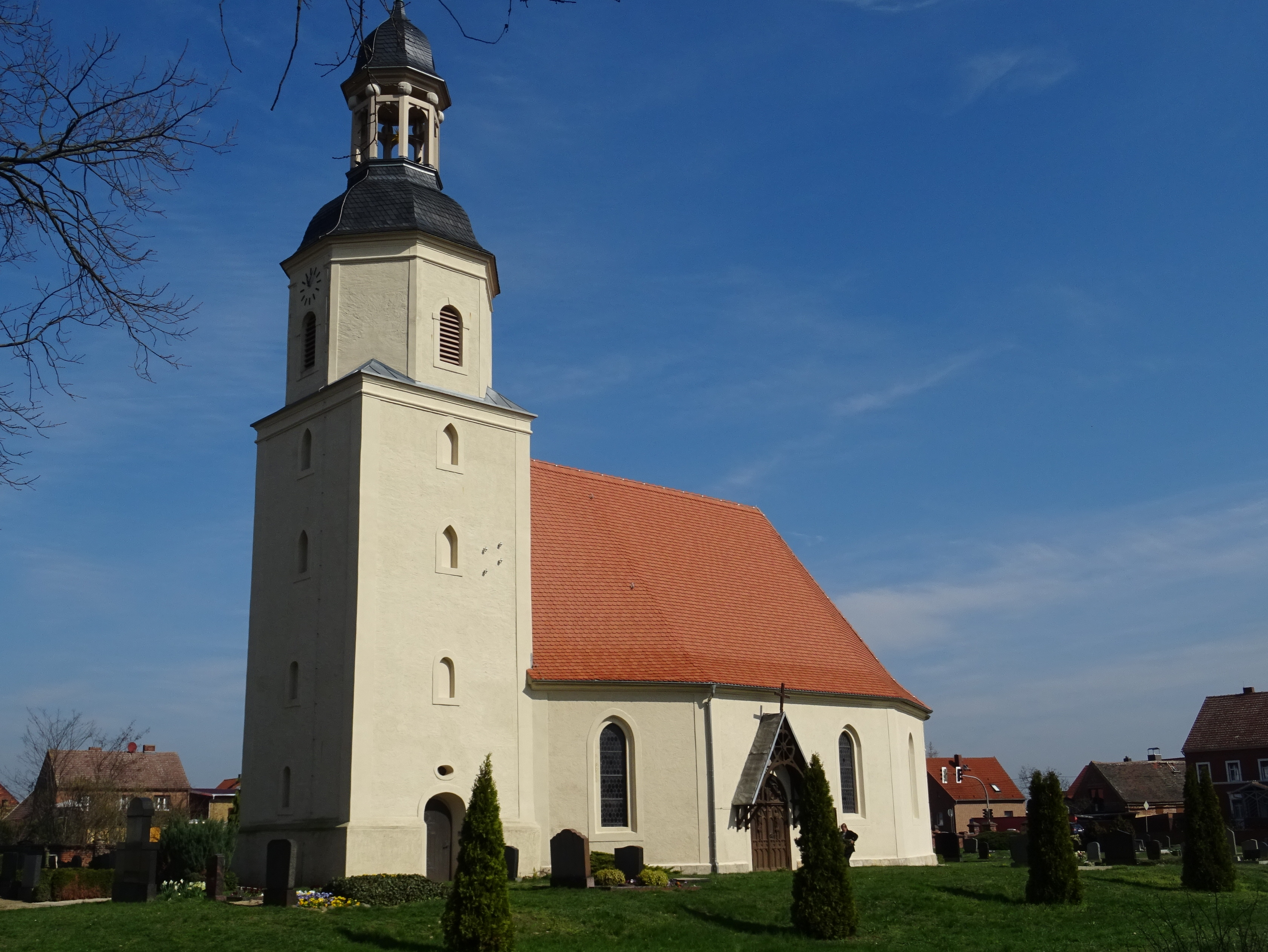 Eutzsch, Kirche von Südwesten